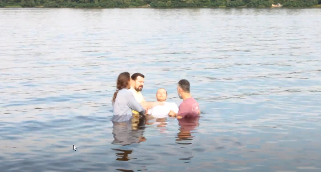 Хрищення на Дніпрі 2019р.